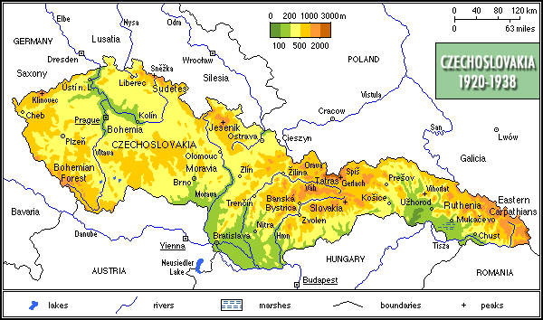 Czechoslovakia 1920-1938, physical/Czechoslowacja 1920-38, fizyczna